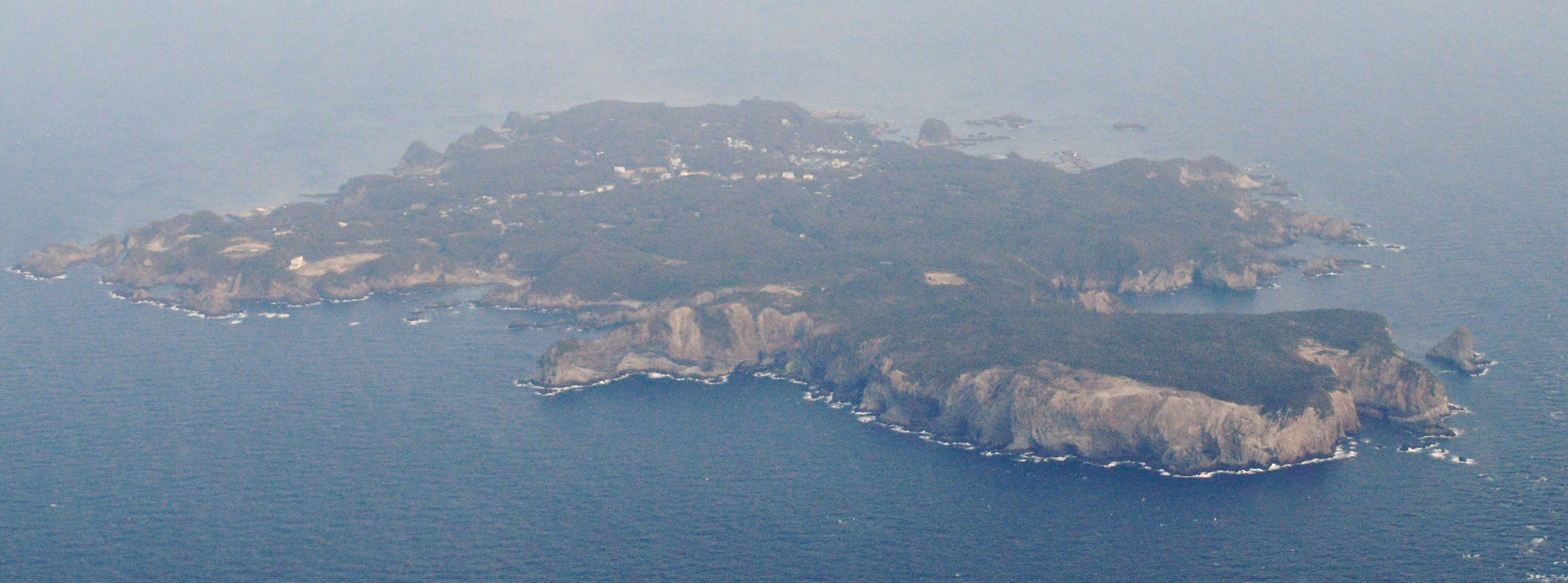 式根島全景 (空撮)